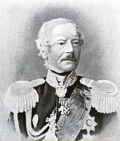 Богданович, Модест Иванович